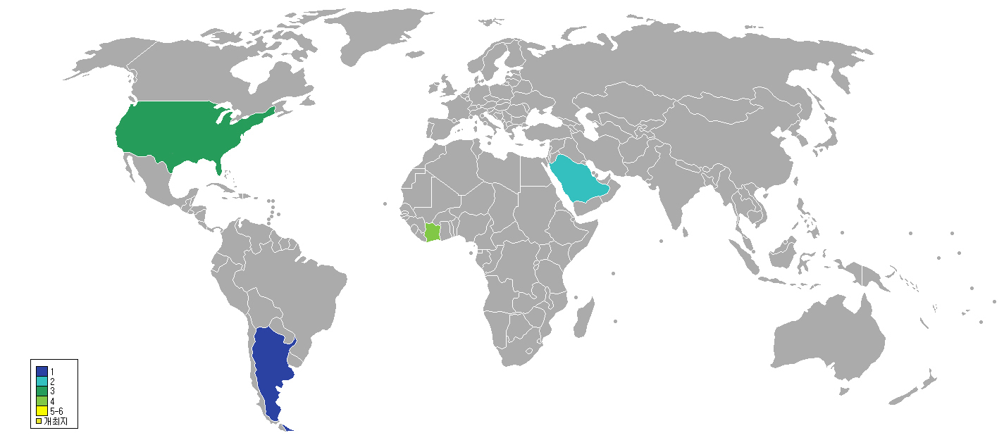 지도